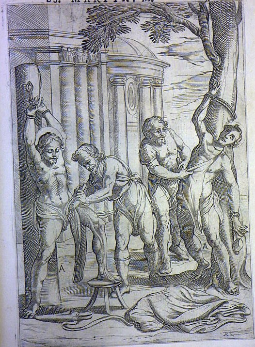 écorchement de martyrs chrétiens domaine public